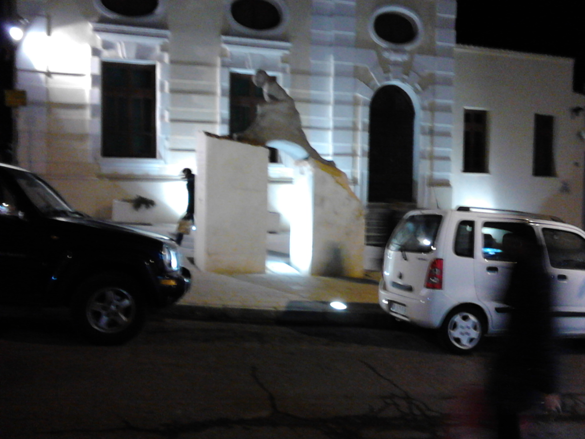 Fari da incasso a terra per l'illuminazione di un monumento e della facciata della caserma G di F di Nuoro